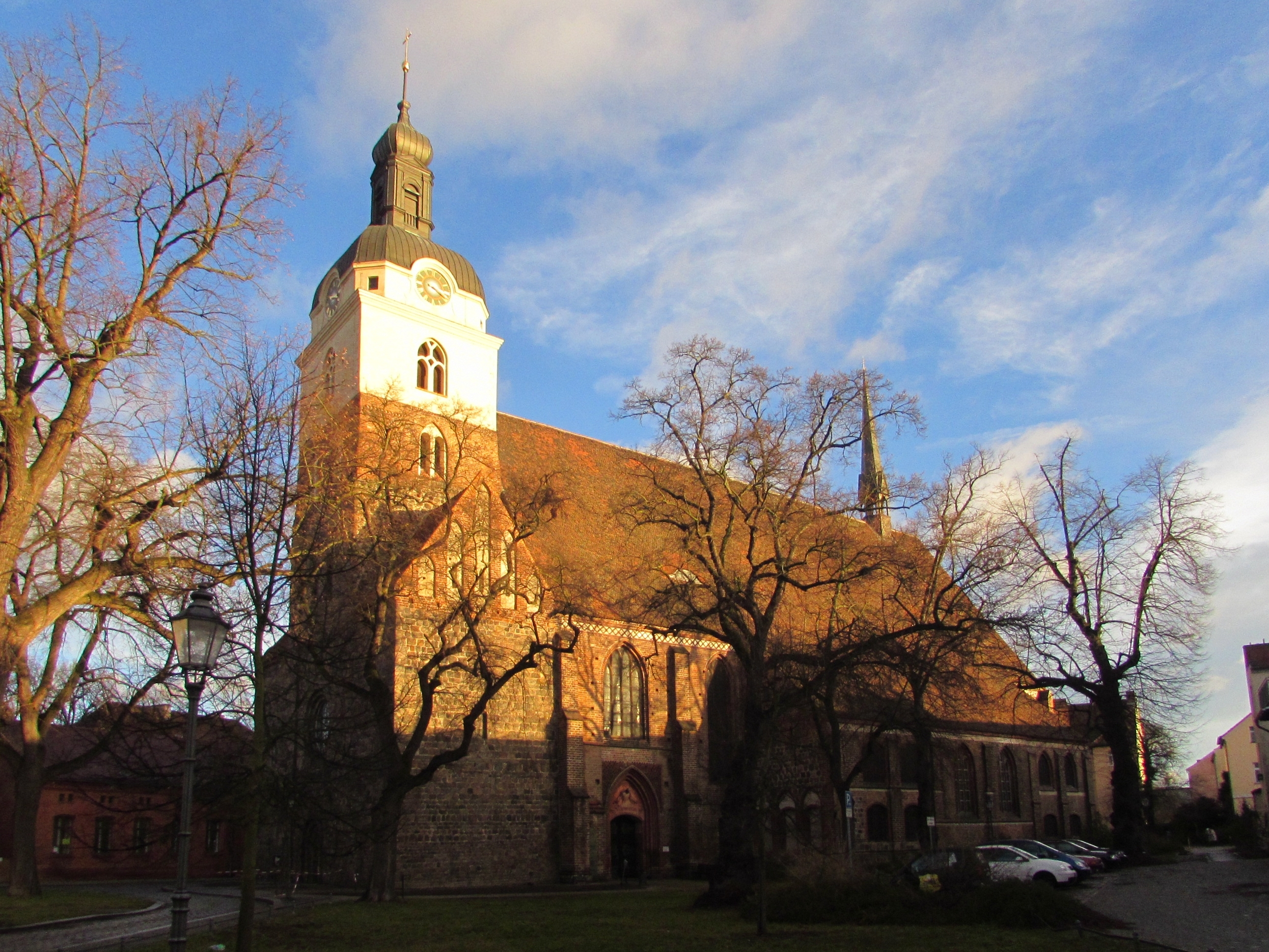 st gotthard brandenburg